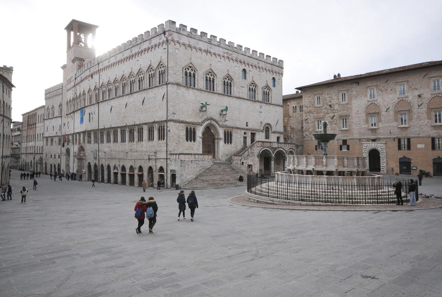 Veduta di Piazza IV Novembre, Perugia (Italy)